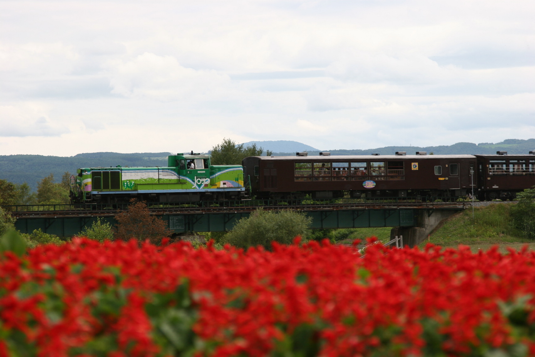 富良野・美瑛ノロッコ号